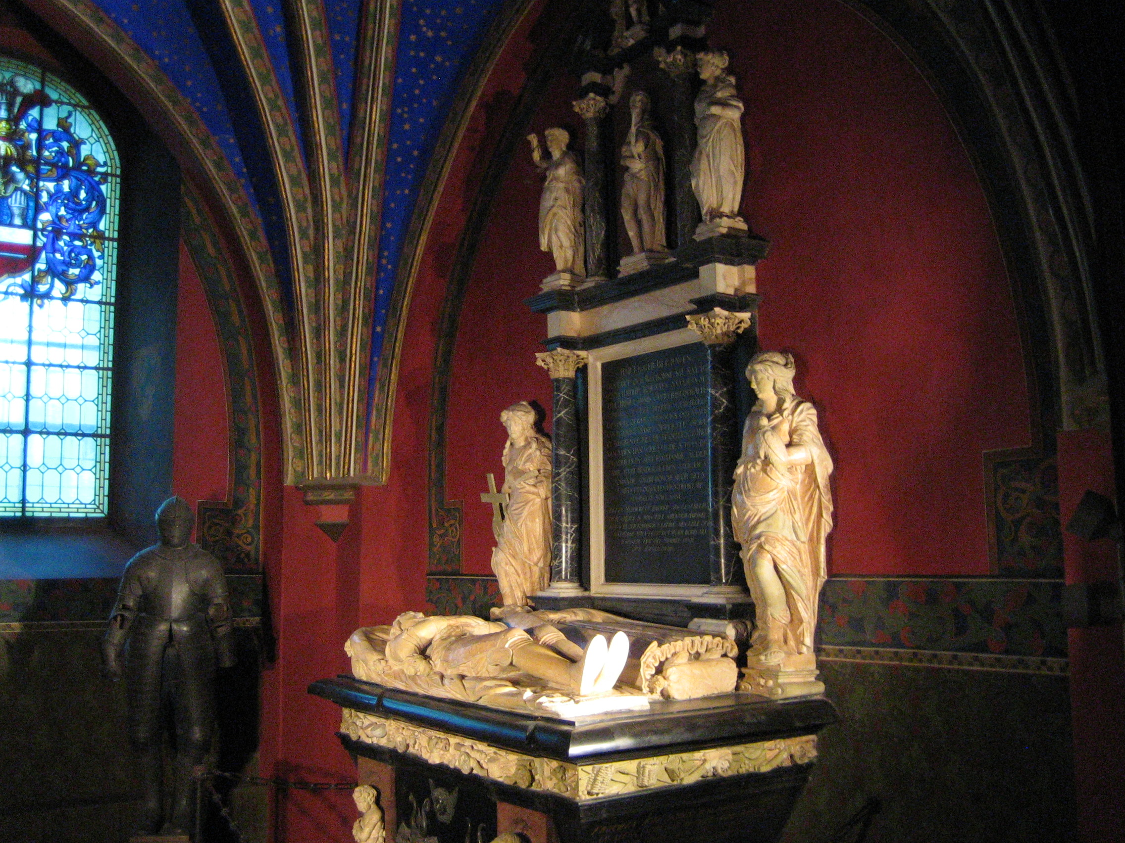 (2008-07-06T19-26-54.jpg)